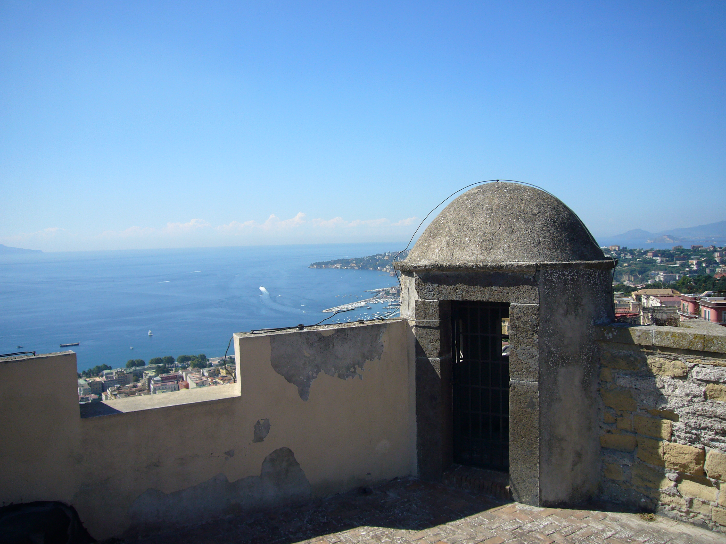 Napoli, Castel Sant'Elmo: garitta verso Posillipo